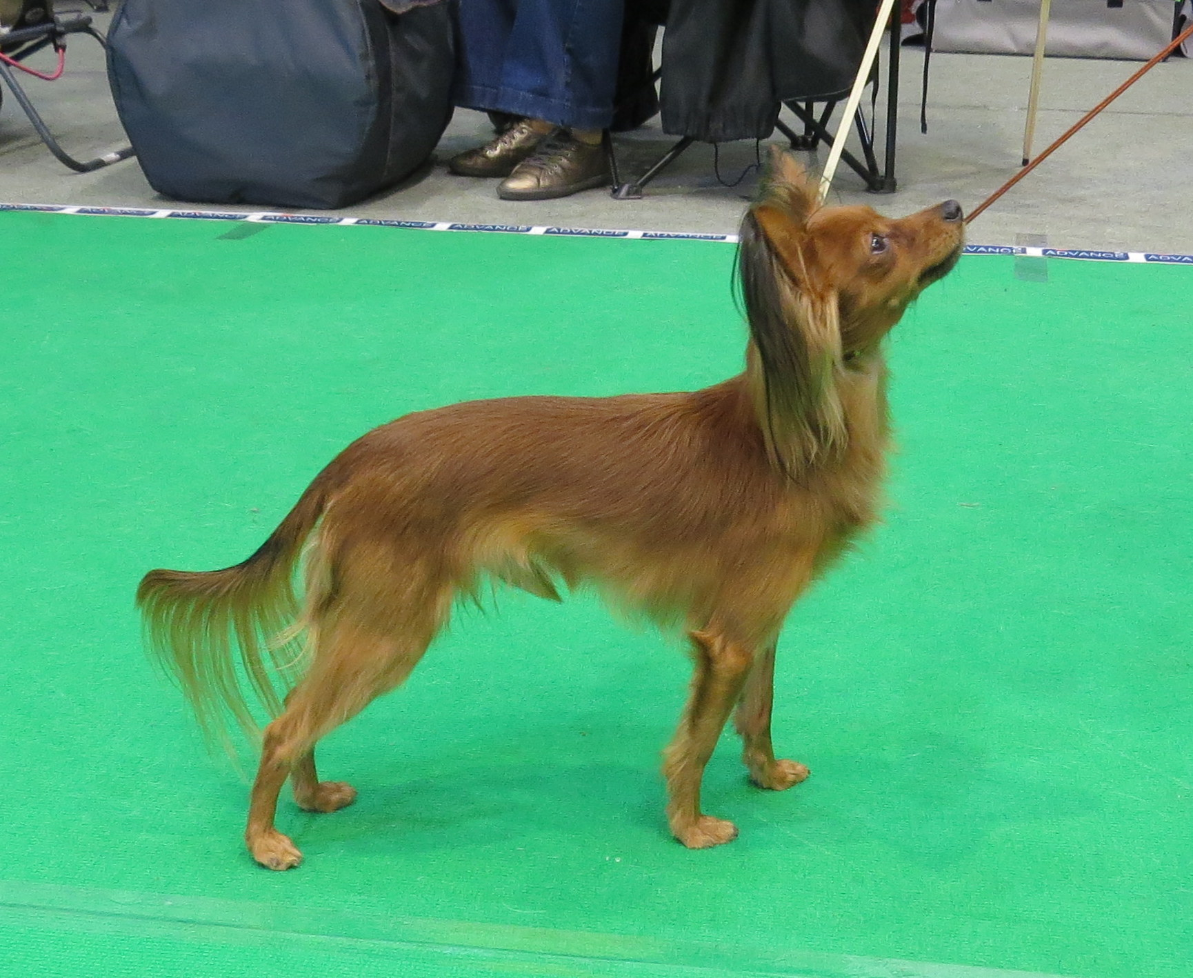 Русский той длинношёрстный